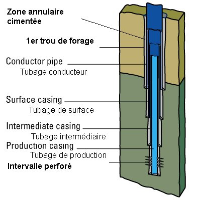 Schéma d'un forage